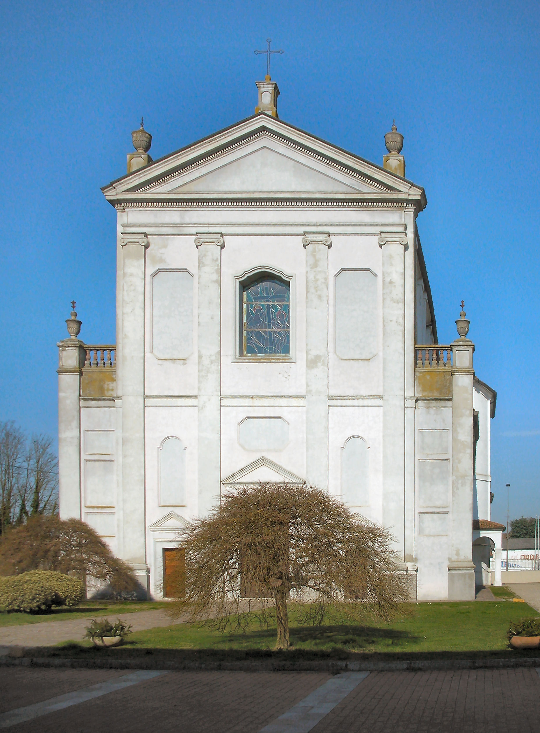 Martignana di Po chiesa parrocchiale